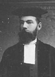 Jan Derk Domela Nieuwenhuis Nyegaard (Amsterdam, 25 juli 1870 - Amsterdam, 4 januari 1955), predikant, publicist, flamingant en activist in België 1914-1918